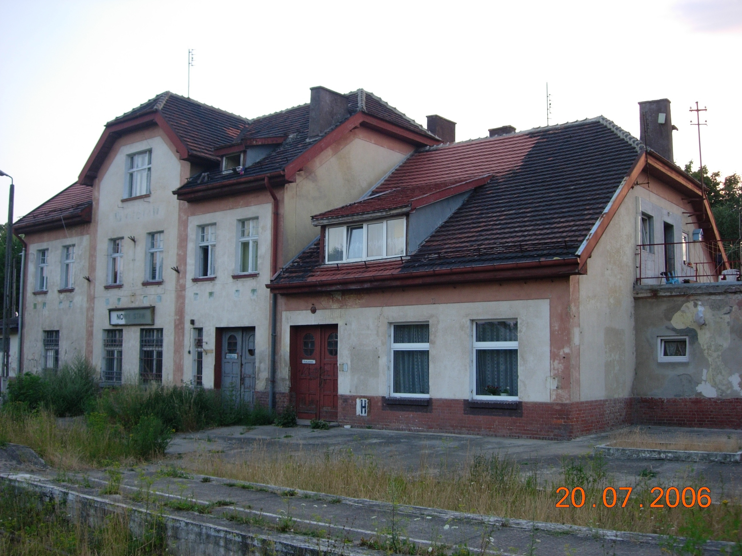 Dworzec PKP w Nowym Stawie